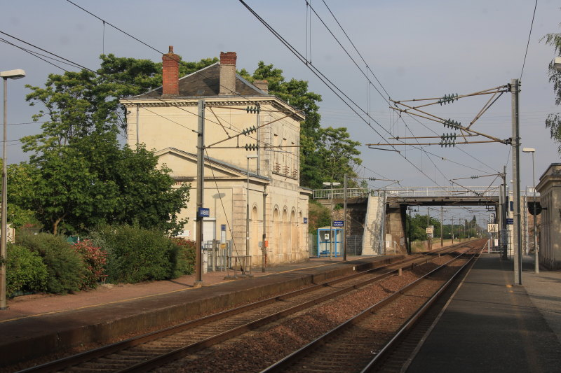 bâtiment voyageur et voies de la gare de la Ménitré